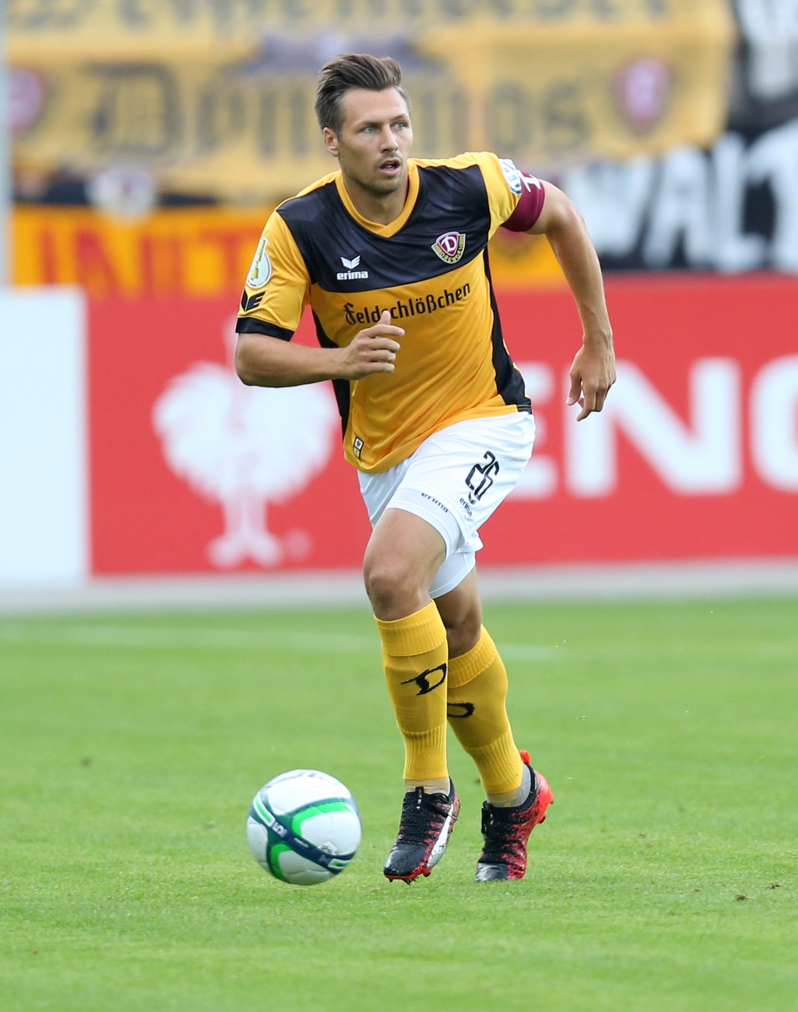 DFB-Pokal 2017/18, 1. Hauptrunde, TuS Koblenz gegen SG Dynamo Dresden: Sören Gonther (SG Dynamo Dresden)